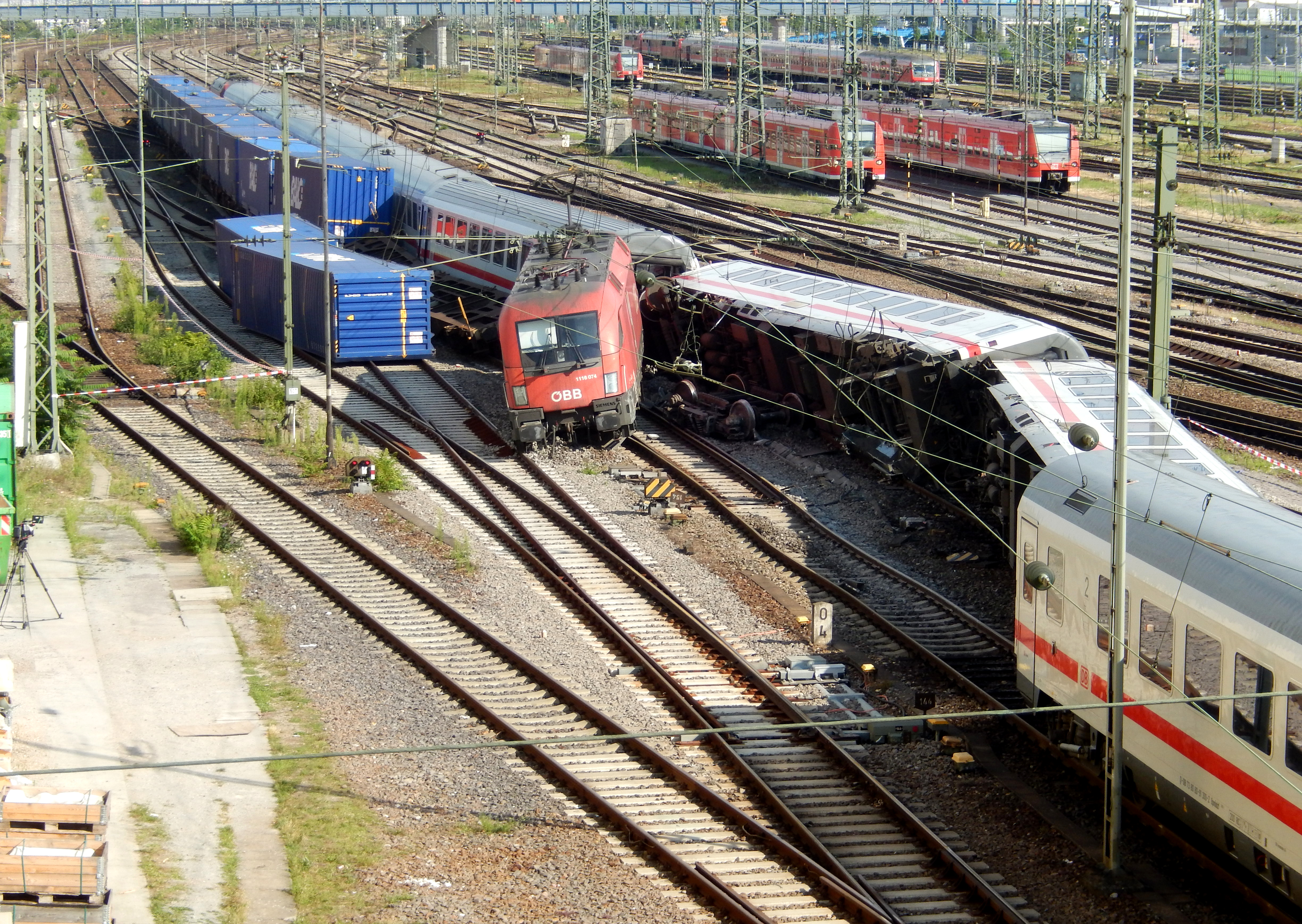 Ein Eisenbahnunfall infolge einer Flankenfahrt des Güterzugs DGS 40635 in den EuroCity 216 im südöstlichen Gleisvorfeld des Mannheimer Hauptbahnhofs